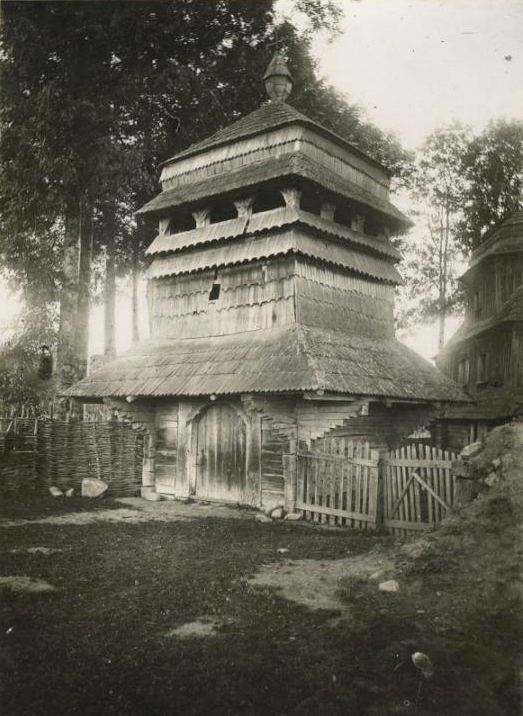 Дзвіниця в с. Гузіїв (в оригіналі "Huciejów pow. doliński" і "Huziejów").